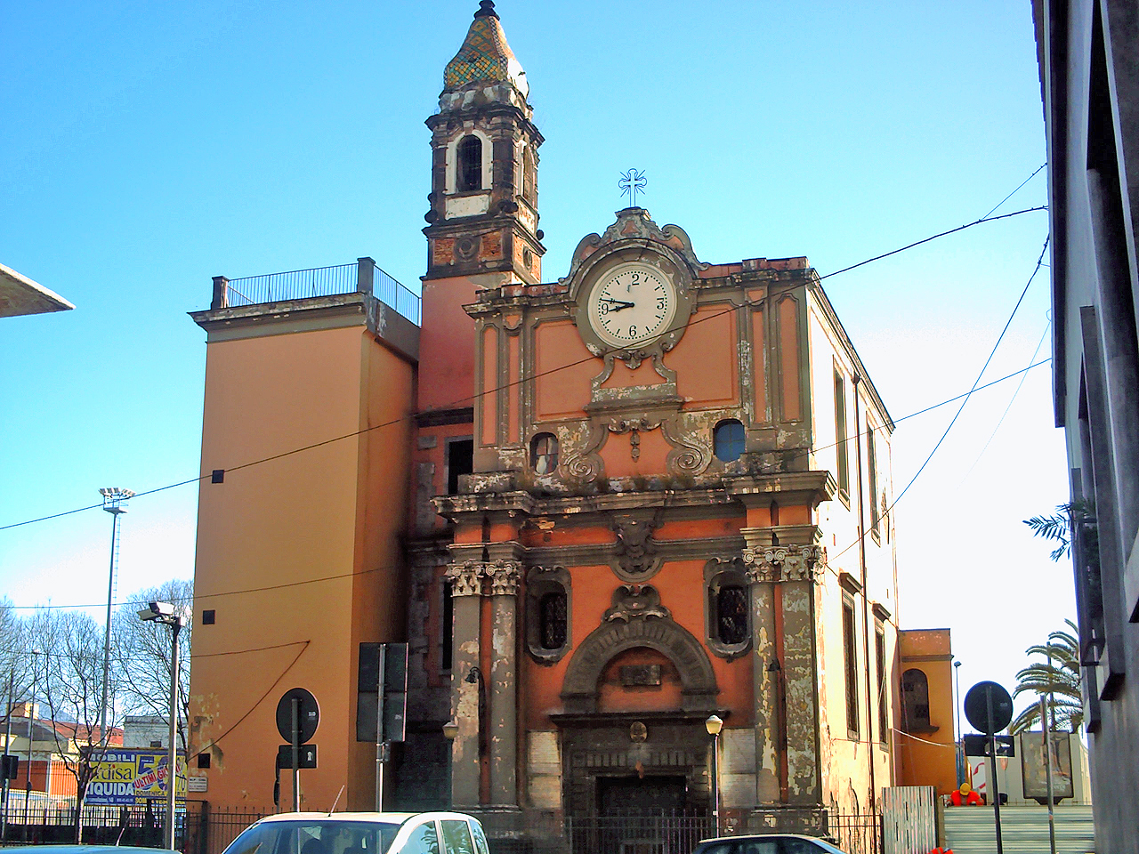 Facciata di Santa Maria di Portosalvo, Napoli